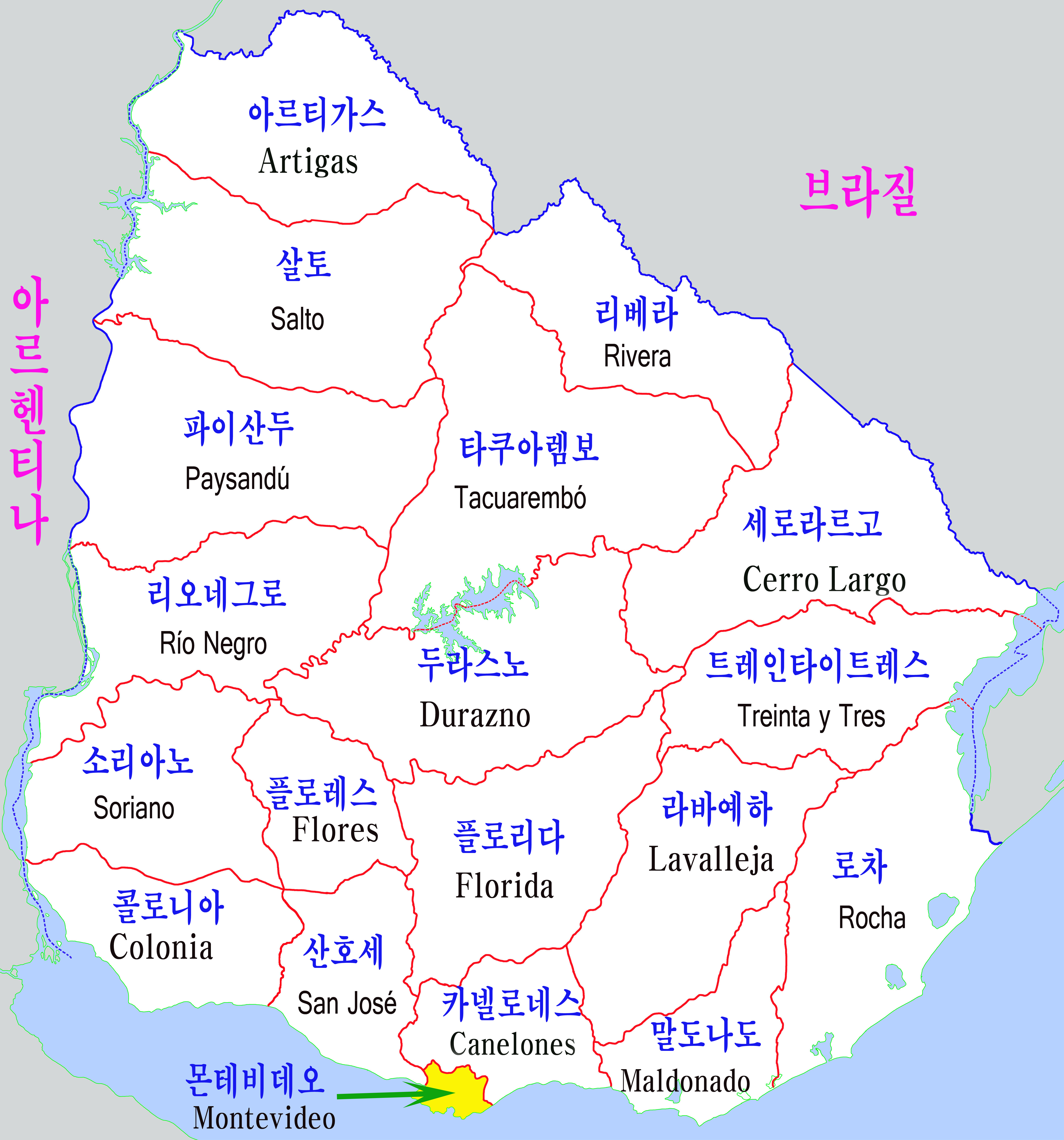 우루과이 행정구역